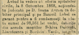 Atestarea oficială a întemeietorului comunei. Restricții drept de autor – NU